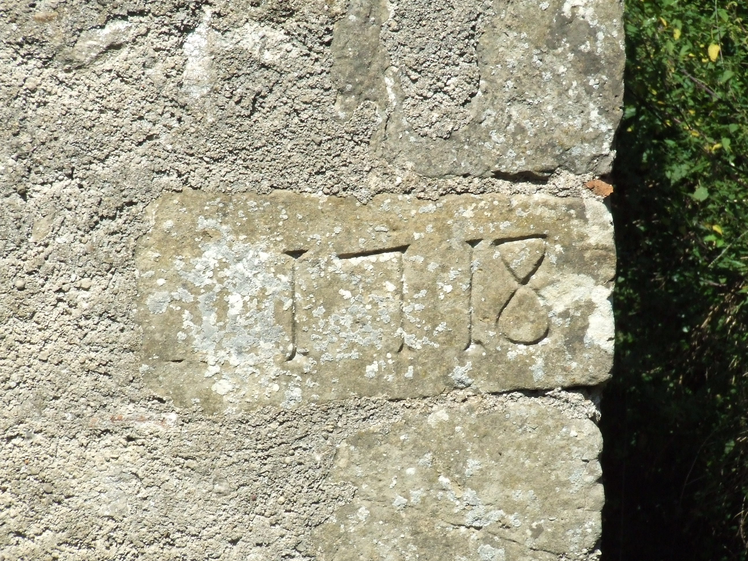 Pedra angular de la Rectoria Vella (Castellcir, Moianès)